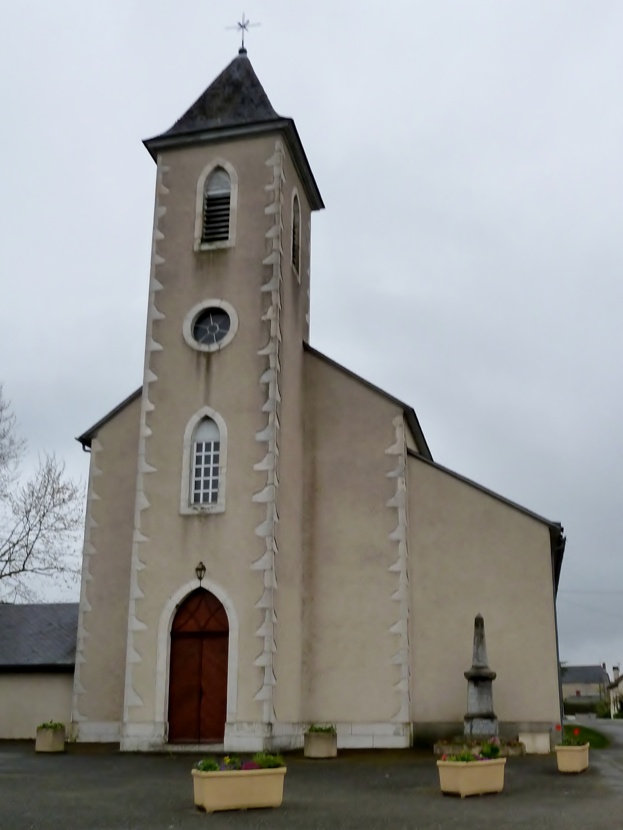 Ouillon, France